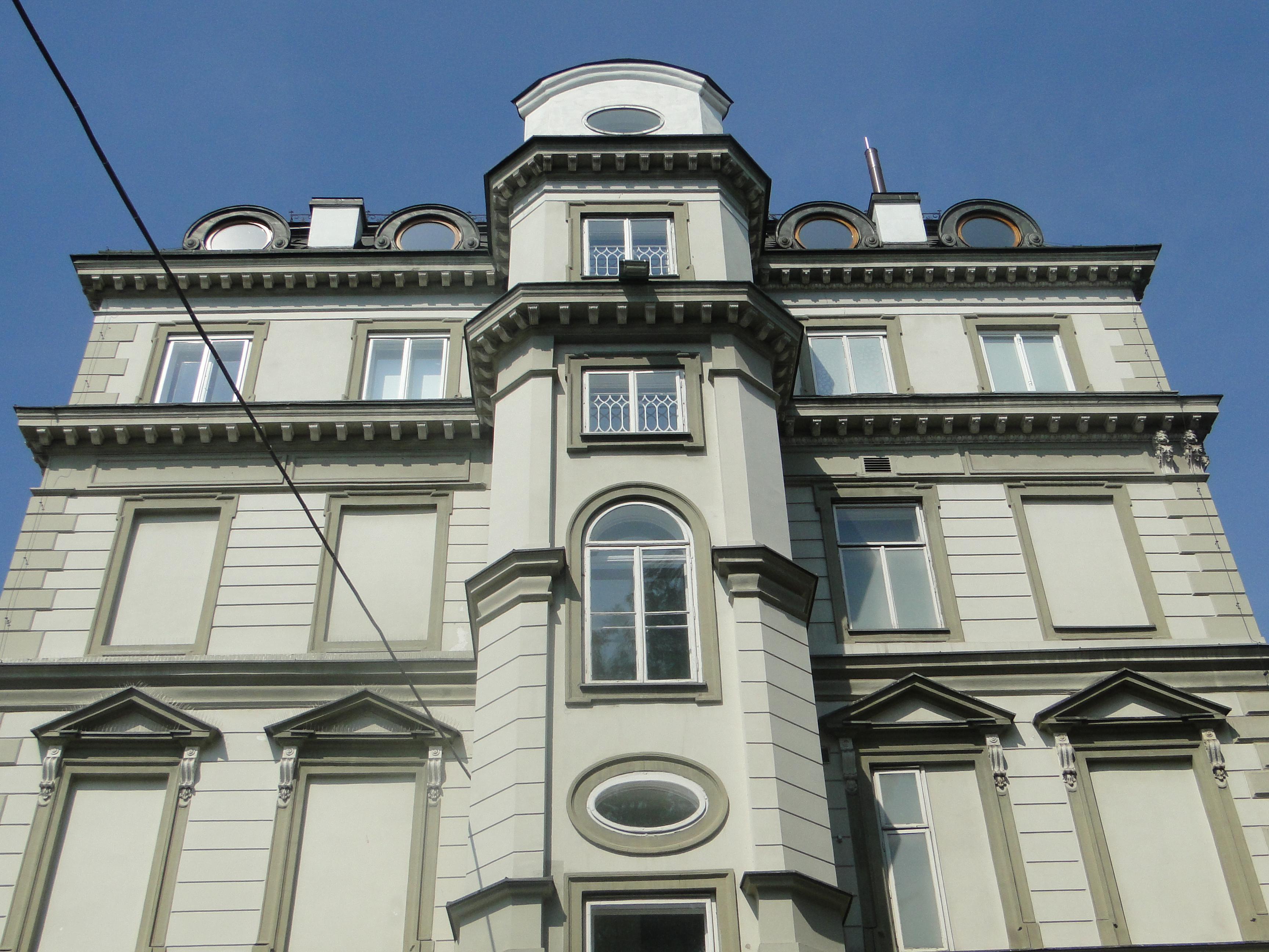 Neorenesansowy pałac Pugetów w Krakowie.